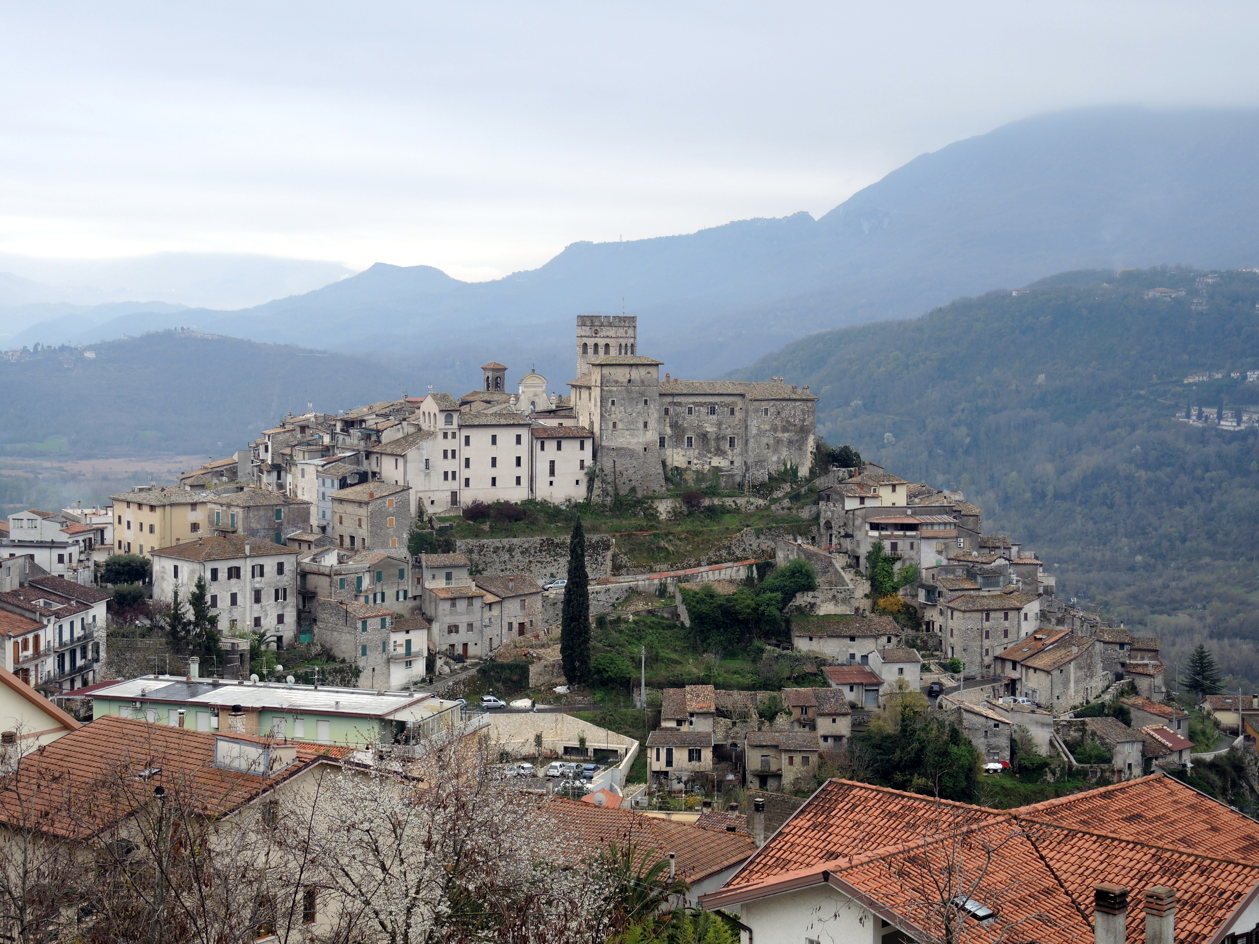 Roviano